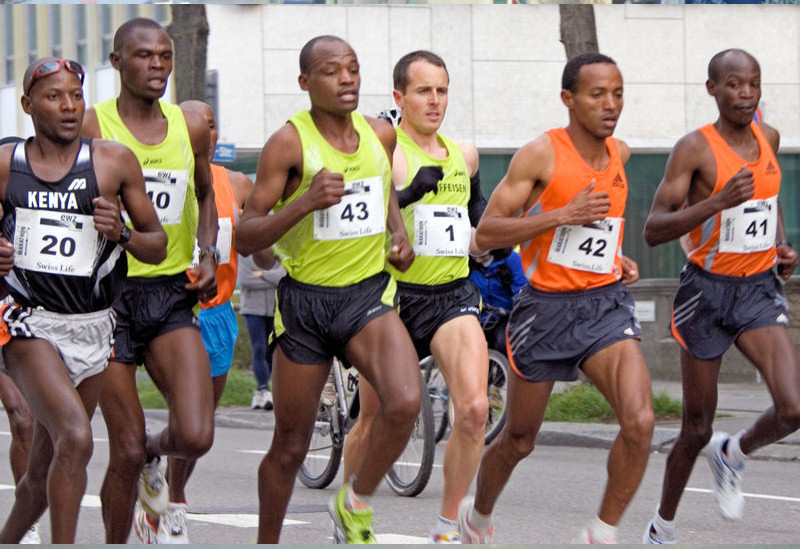 Zürich Marathon 2007: Thumbi Erastus Maina (No. 20, Kenya), Viktor Röthlin (No. 1, Switzerland), No. 40-43: Pacemakers